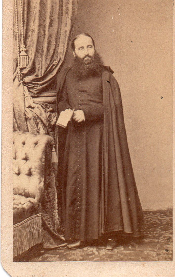 Cdv du Père Marie-Alphonse Ratisbonne en 1865.